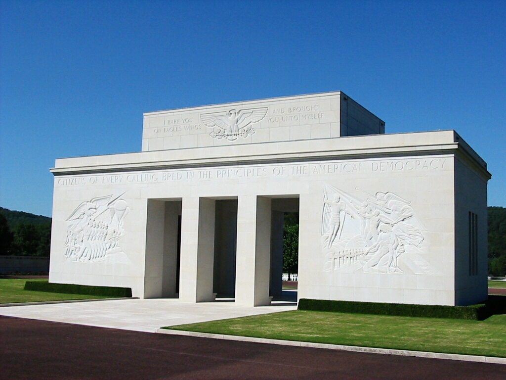 American Cemetery of Épinal (département des Vosges, France) Photographie personnelle prise le 29 août 2005. Copyright © Christian Amet